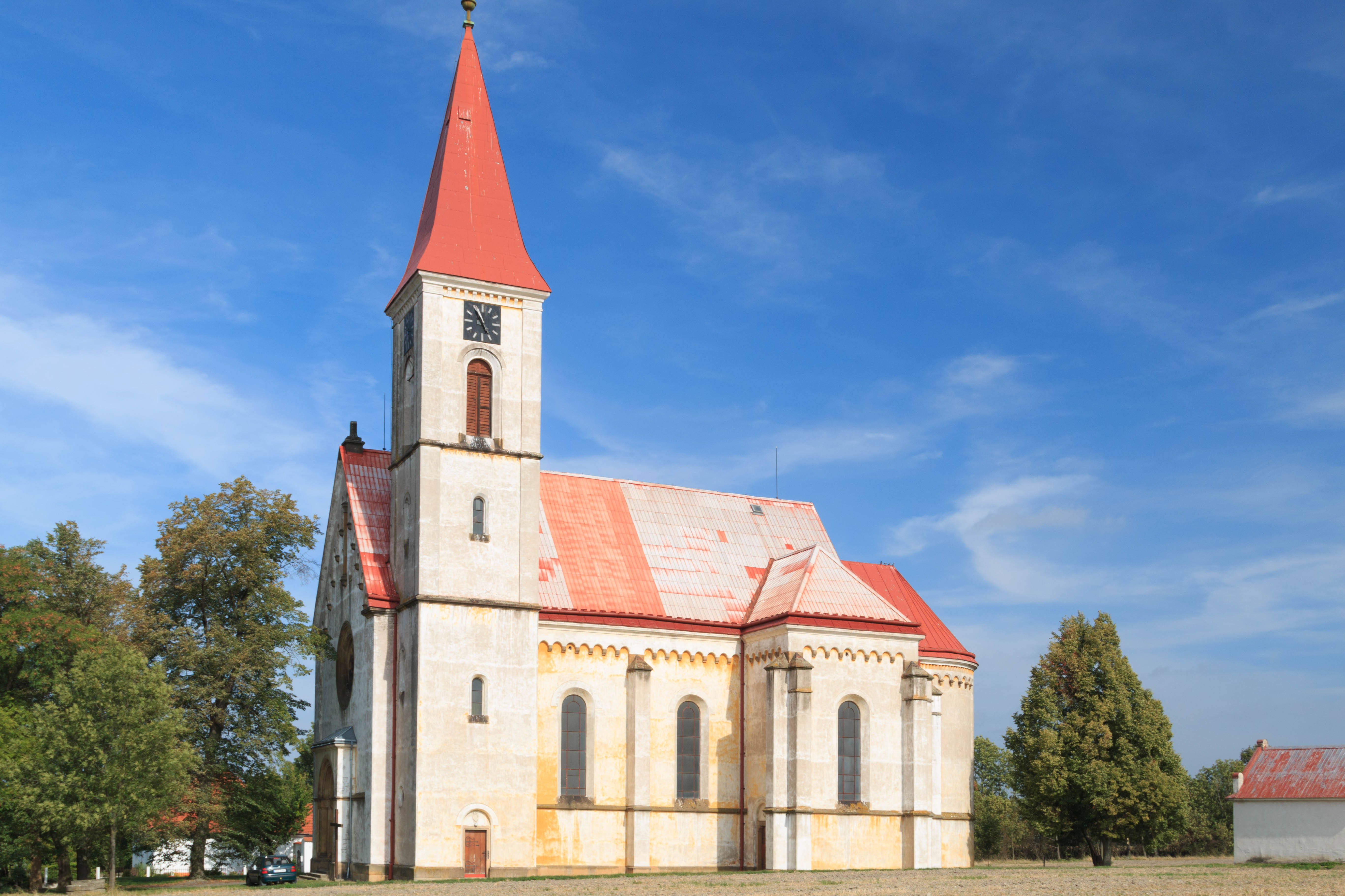 Church of the Assumption (Vrbice)